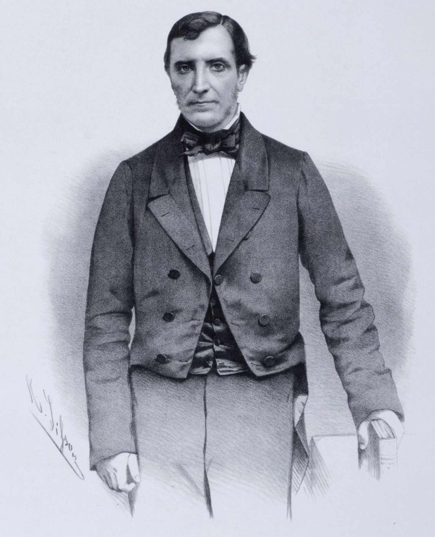 Litografia em preto e branco